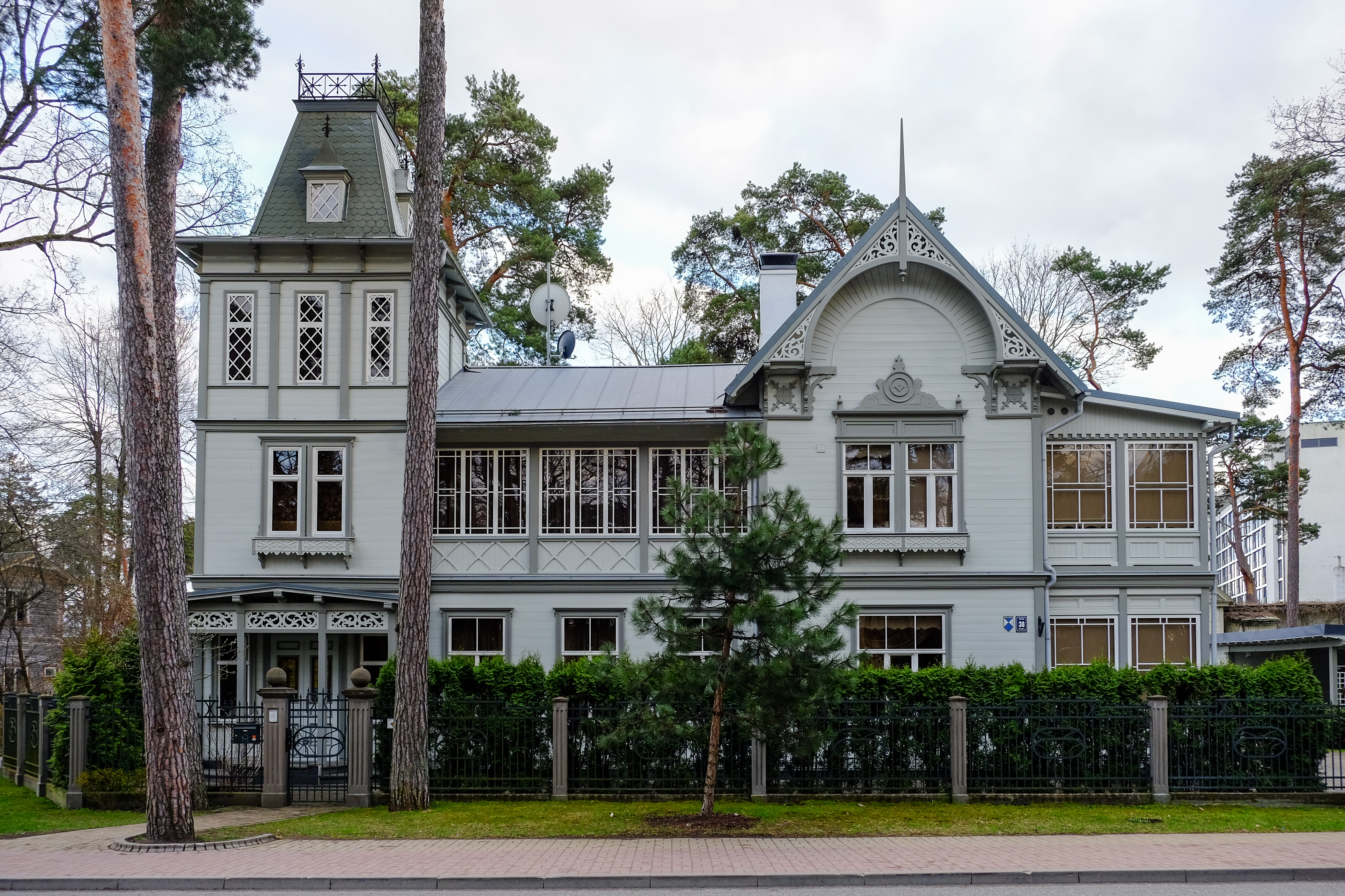 Dzīvojamā ēka - pansija, Jūrmala, Jūras iela 38